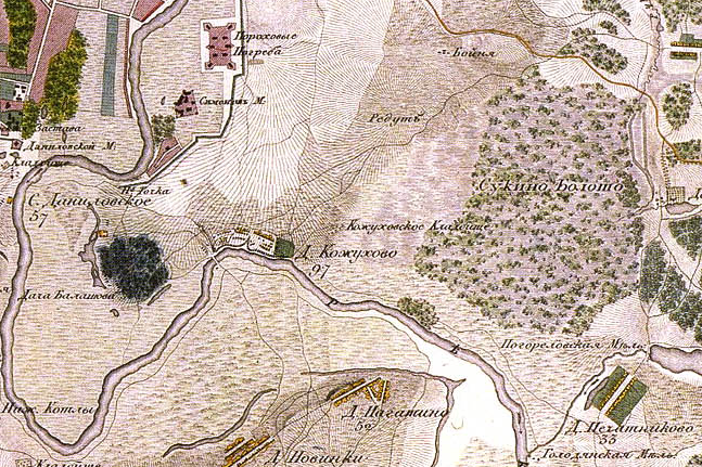 Участок. Топографическая карта окружности Москвы, снятая офицерами Квантирмейстерской части 1818 года. Гравирована и печатана в военно-топографическом бюро при главном штабе его импереторского Величества 1823 года.